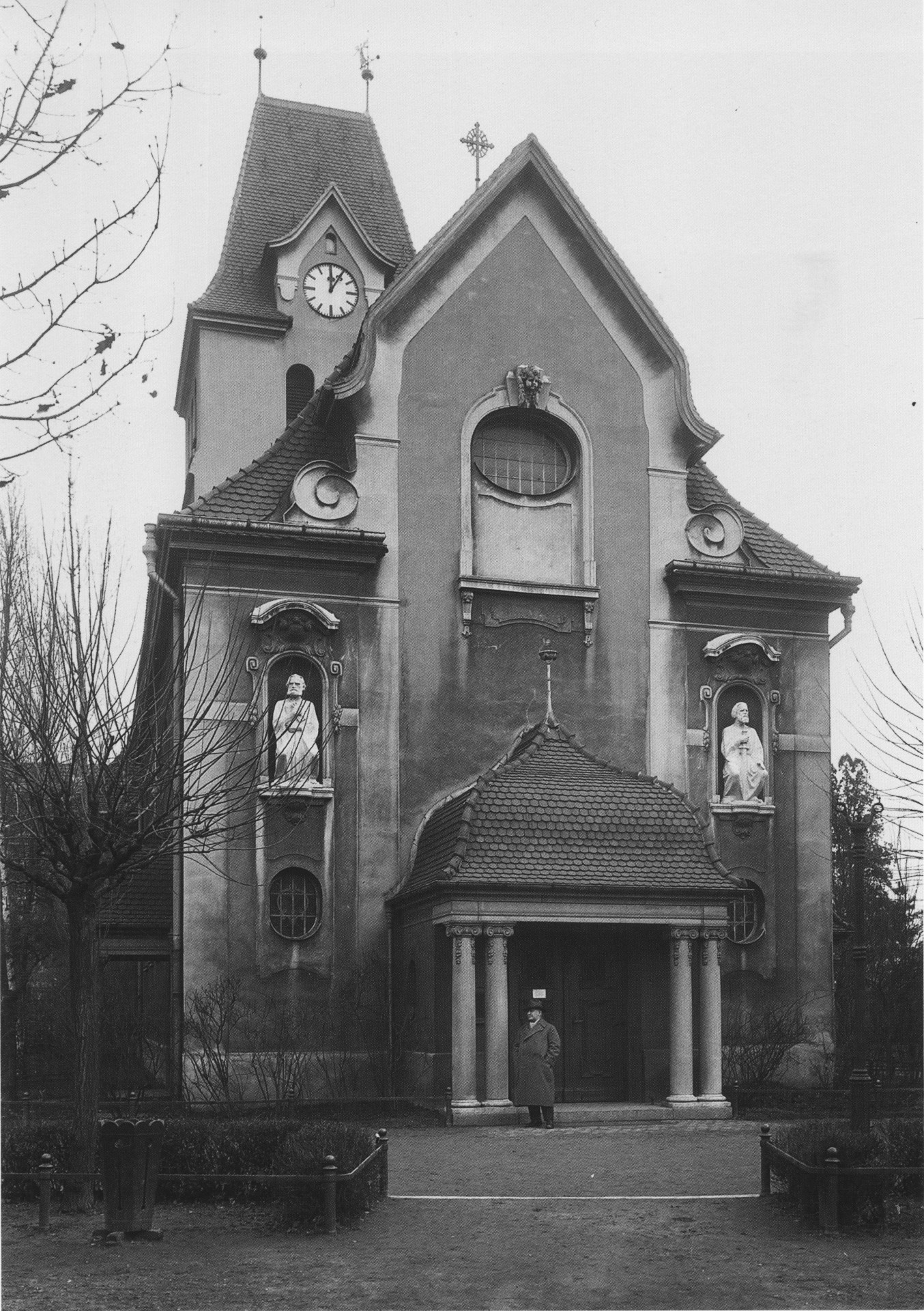 Apostelkirche in Leipzig, Dieskau-/Huttenstraße, Westfassade mit Sitzfiguren Petrus und Paulus von Johannes Hartmann, 1926.